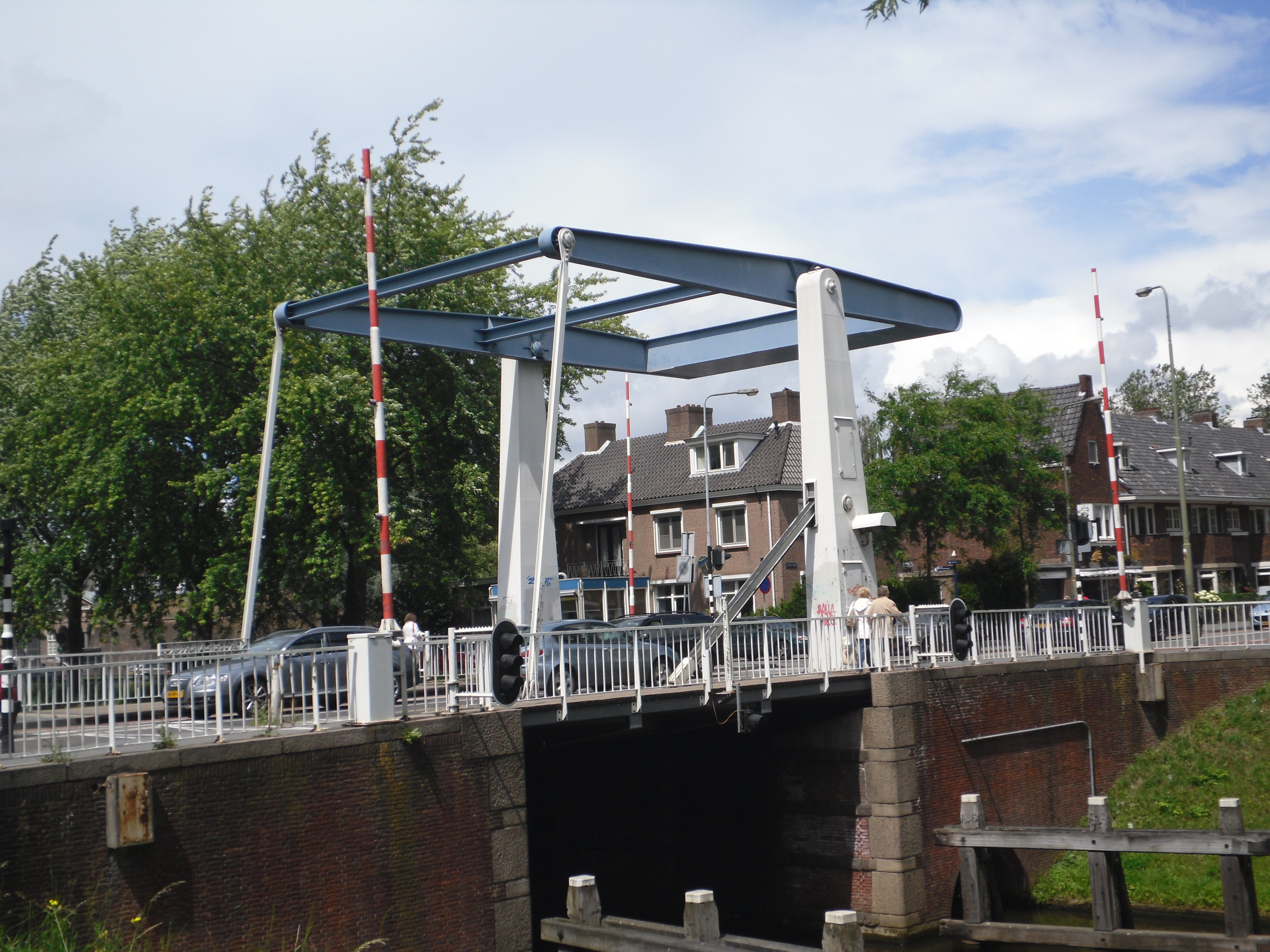 Brug over de Zuid-Willemsvaart. Jan Heinsstraat/Citadellaan, 's-Hertogenbosch